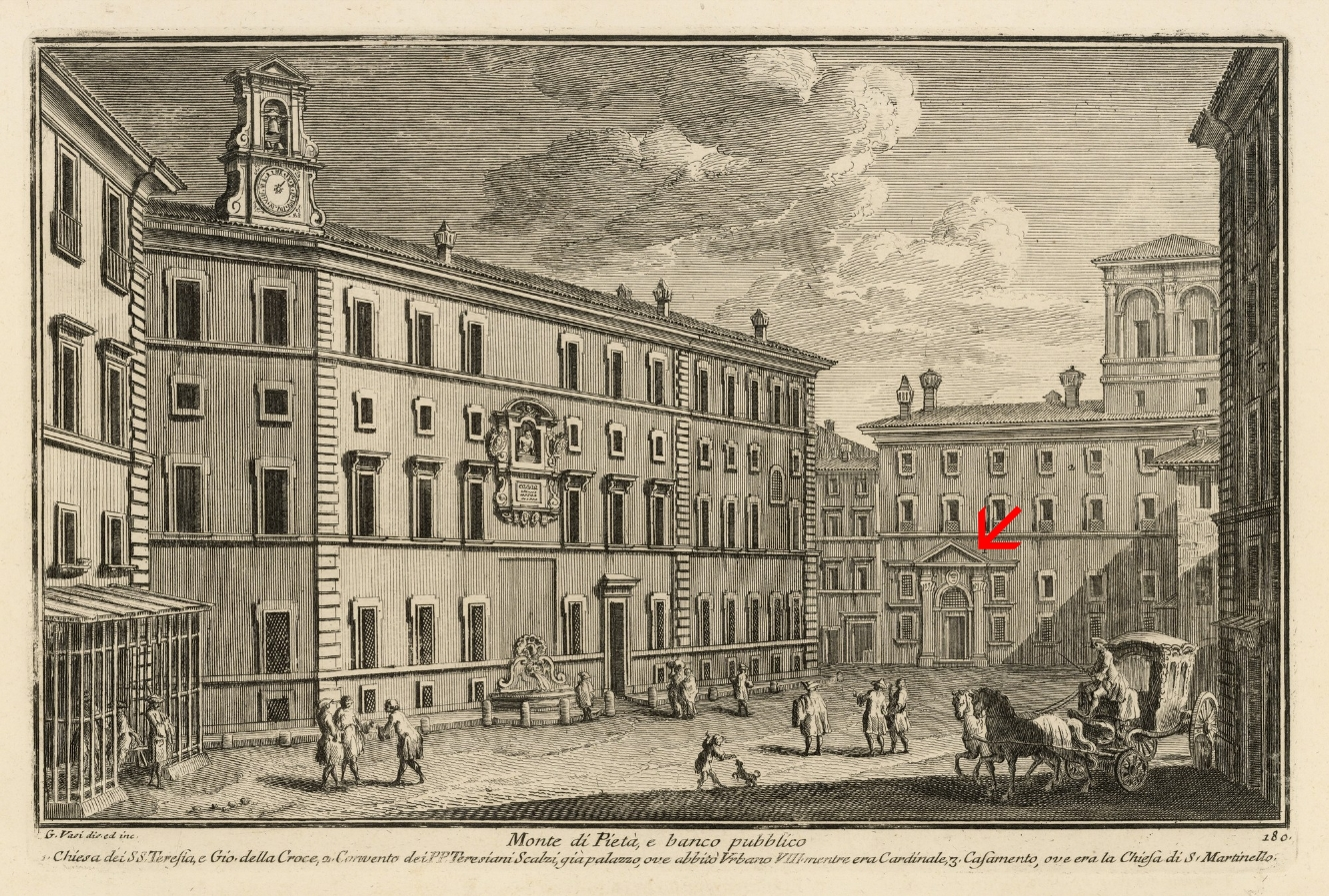 Giuseppe Vasi – Monte di Pietà e chiesa dei Santa Teresa e San Giovanni della Croce dei Carmelitani